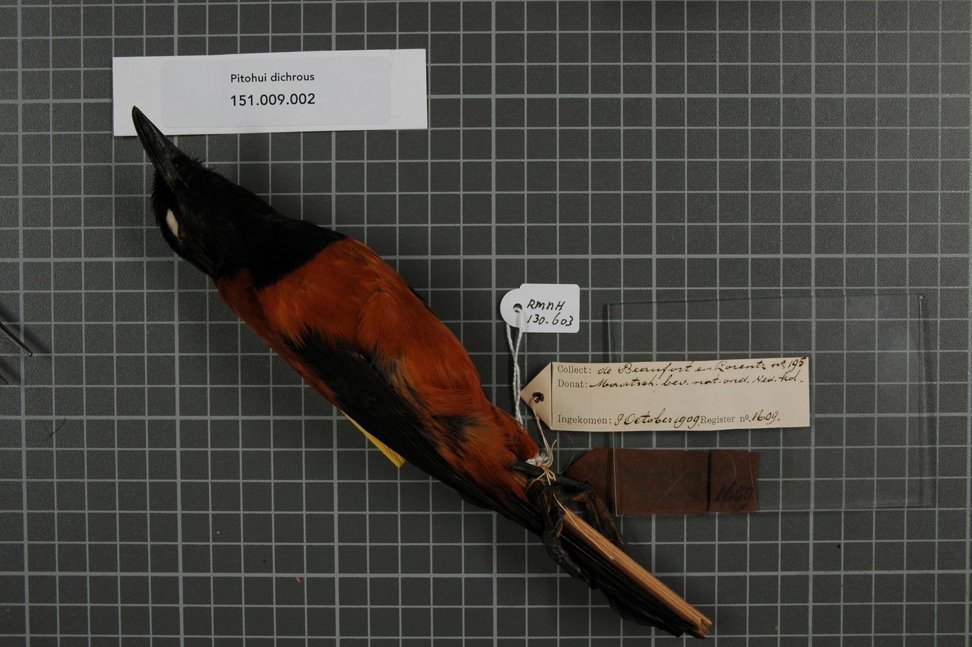 Pitohui dichrous (Bonaparte, 1850)